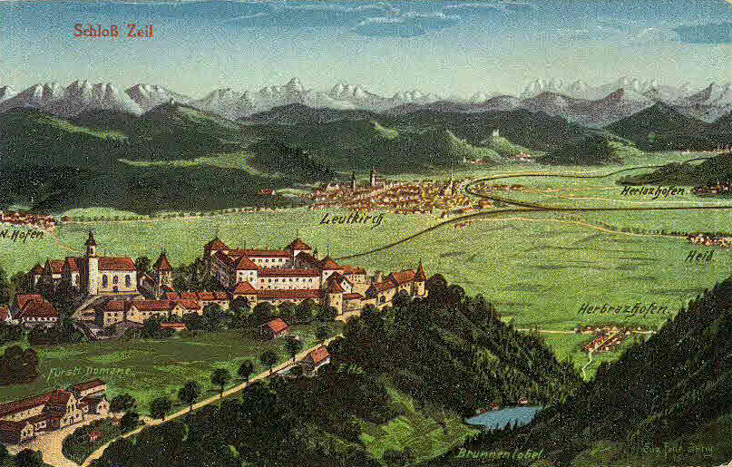 Ansichtskarte von Eugen Felle; Technoseum (Landesmuseum für Technik und Arbeit Mannheim) Motiv: Schloss Zeil und Leutkirch